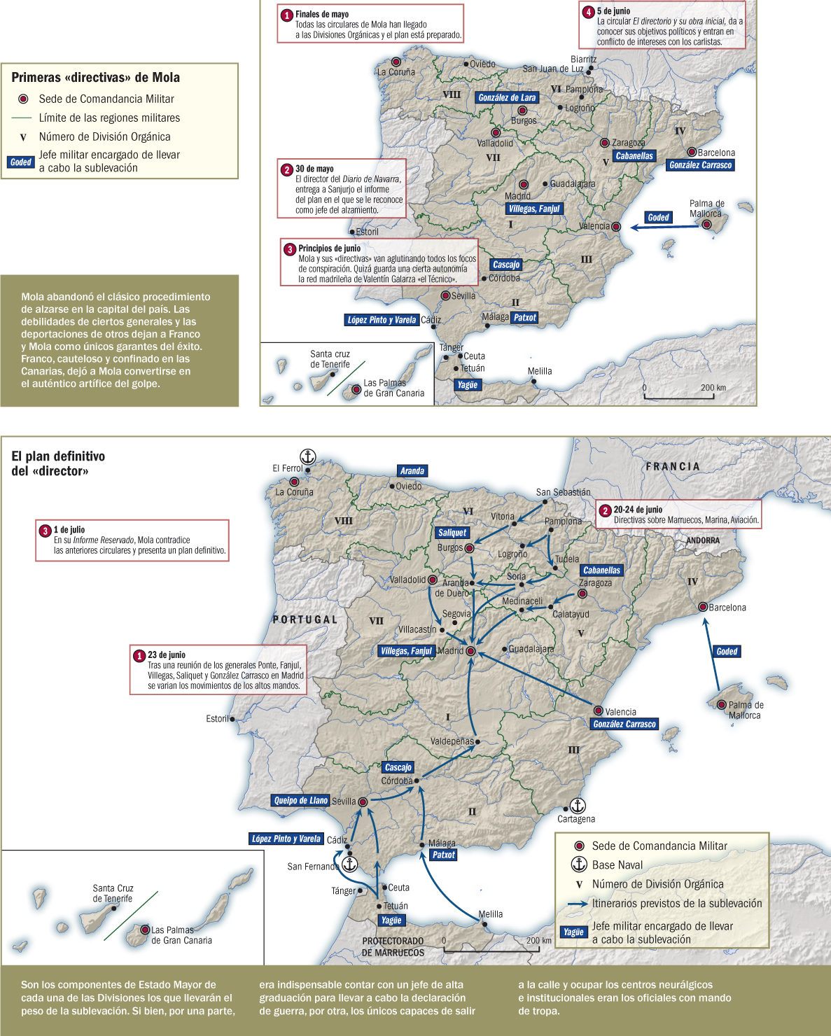 El mapa principal representa el plan definitivo trazado por Mola para el golpe de Estado de julio de 1936. El mapa de menor tamaño muestra una versión anterior del plan de Mola. Página 15 del libro "La sublevación", de Víctor Hurtado (DAU, 2011).